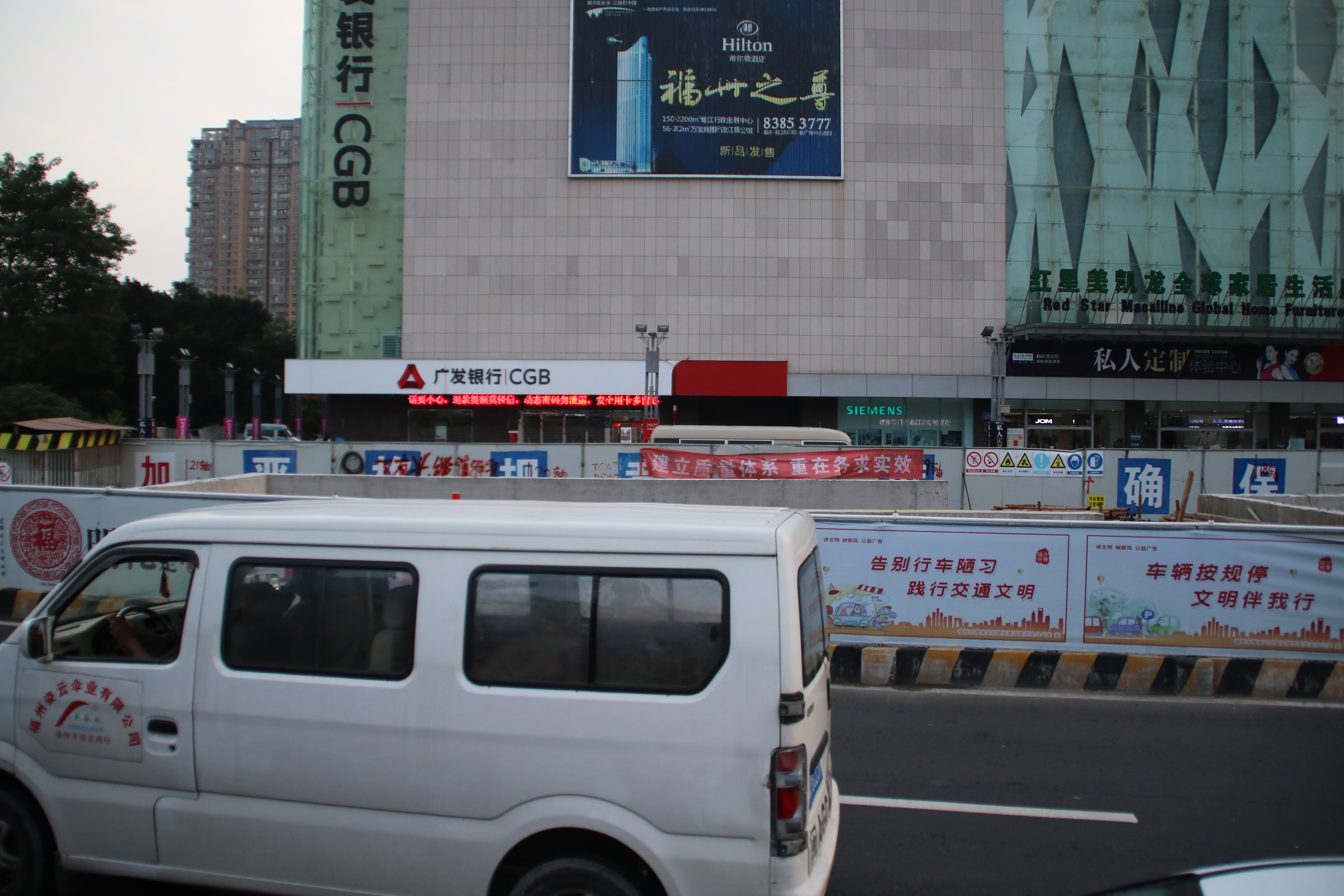 中文（中国大陆）: 福州地铁2号线的宁化站工地 （摄于2016年9月）